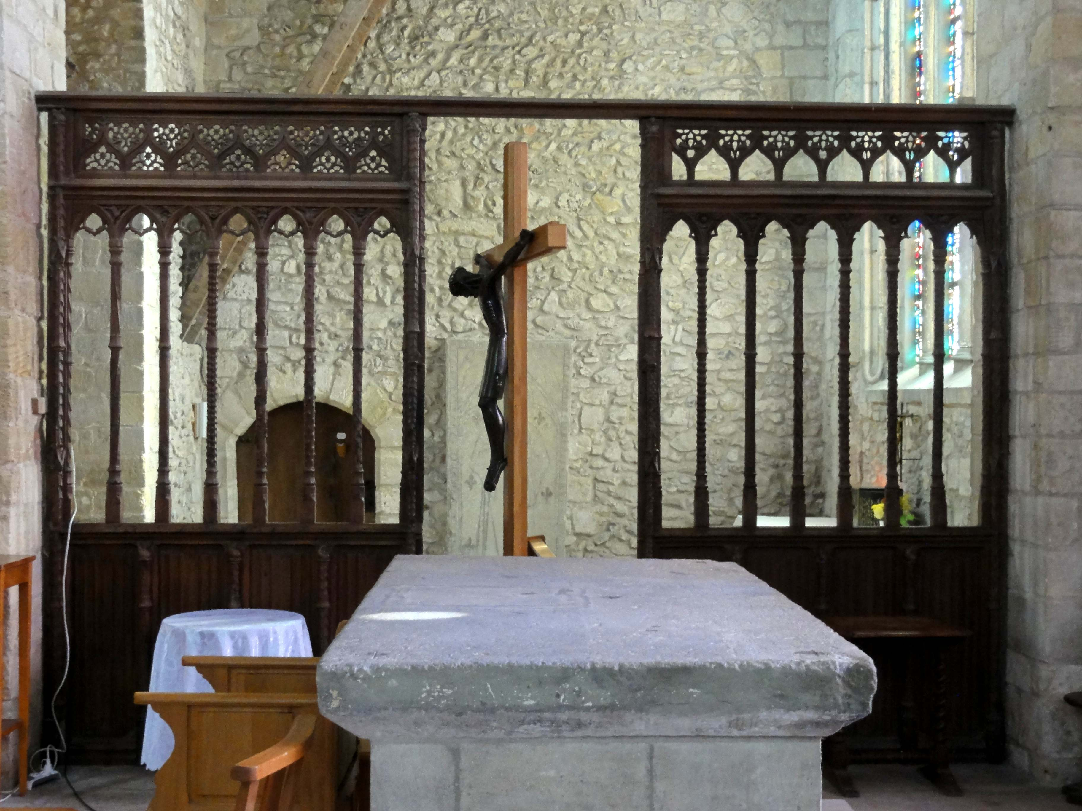 Clôture de chœur.